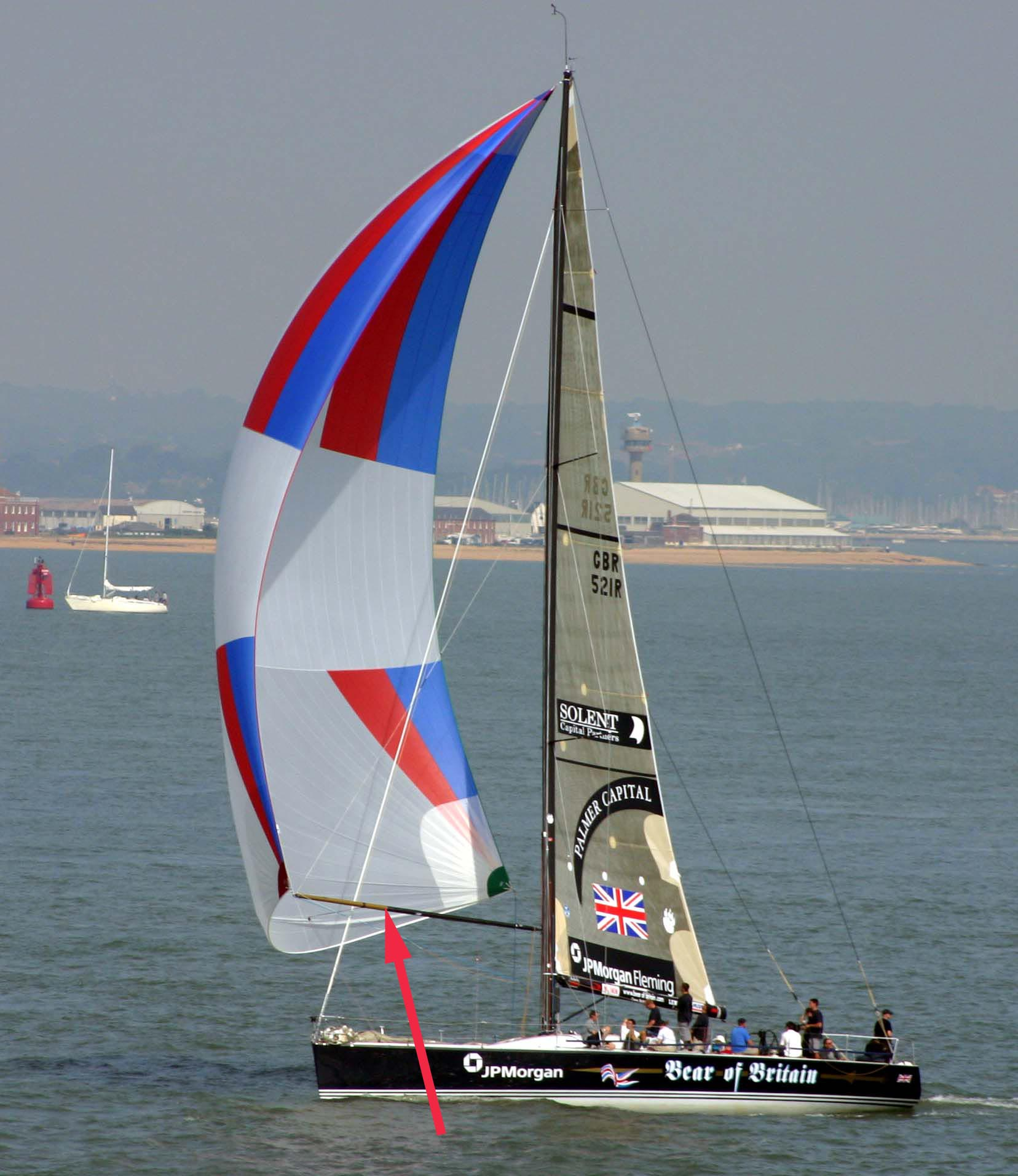 Spinnakerbaum (gekennzeichnet)